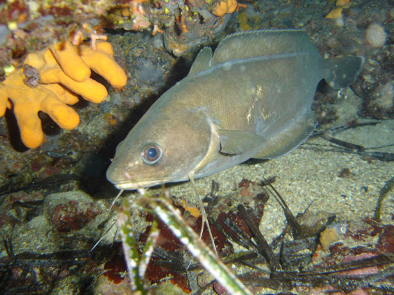 Phycis phycis (Moustelle brune) (Croatie)